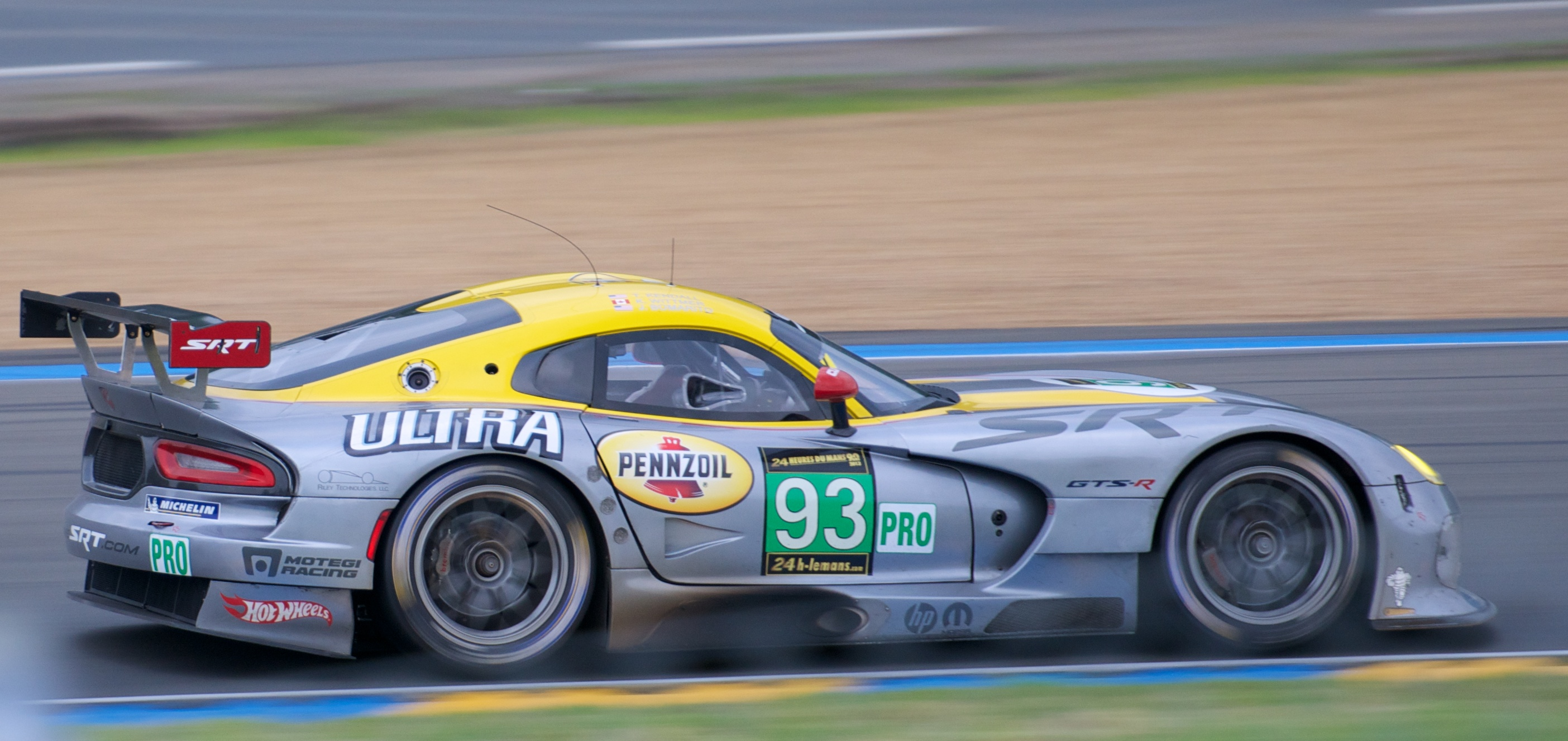 KAM_5135